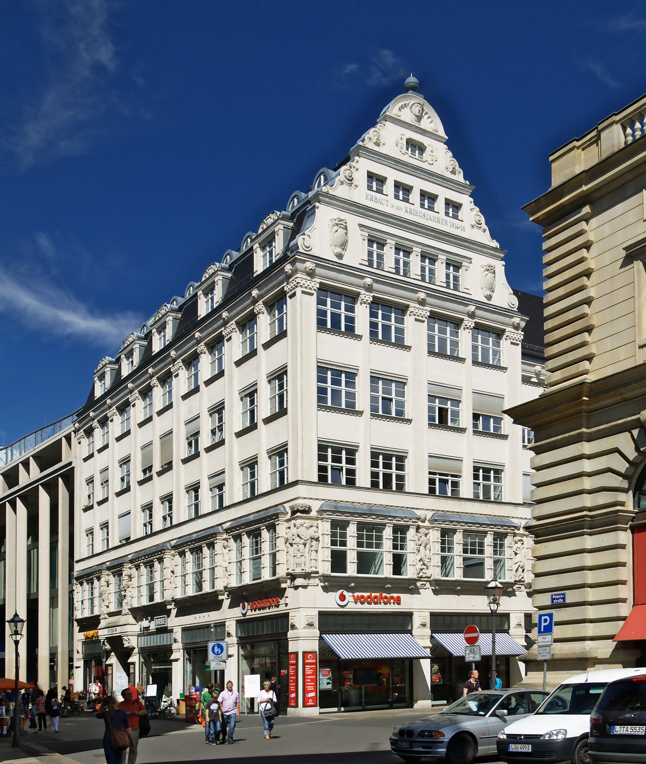 Stentzlers Hof in Leipzig, 2010 - Gesamtansicht.